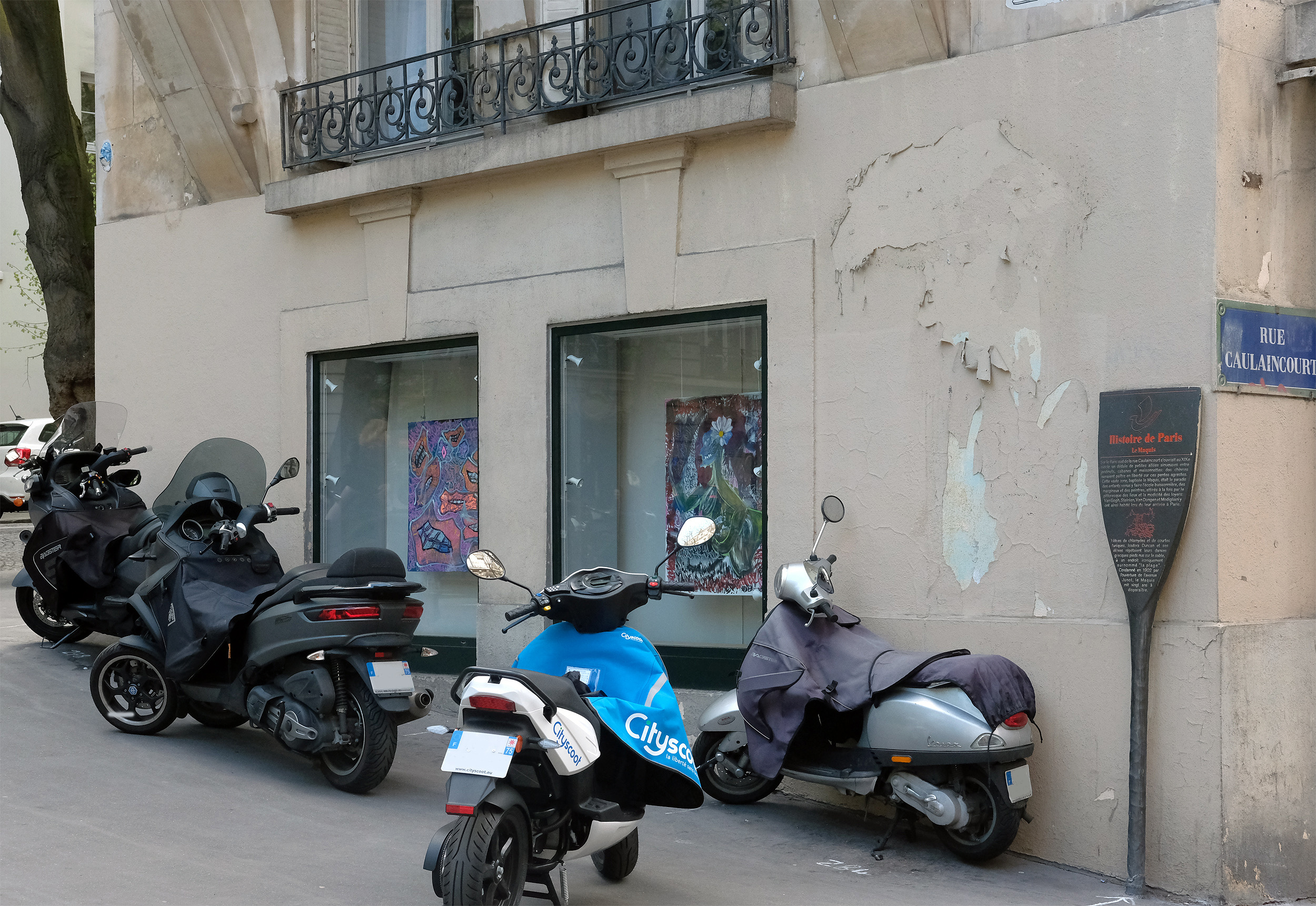 Rue Caulaincourt (panneau Histoire de Paris : Le Maquis) - Paris XVIII